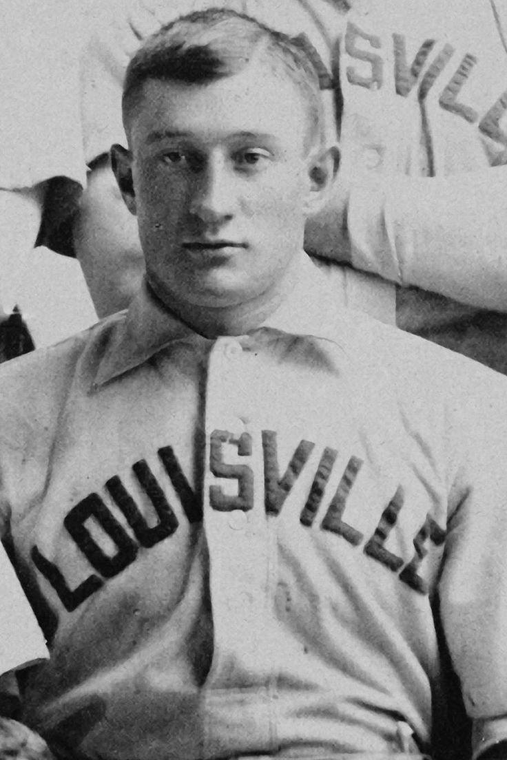 Honus Wagner in 1897